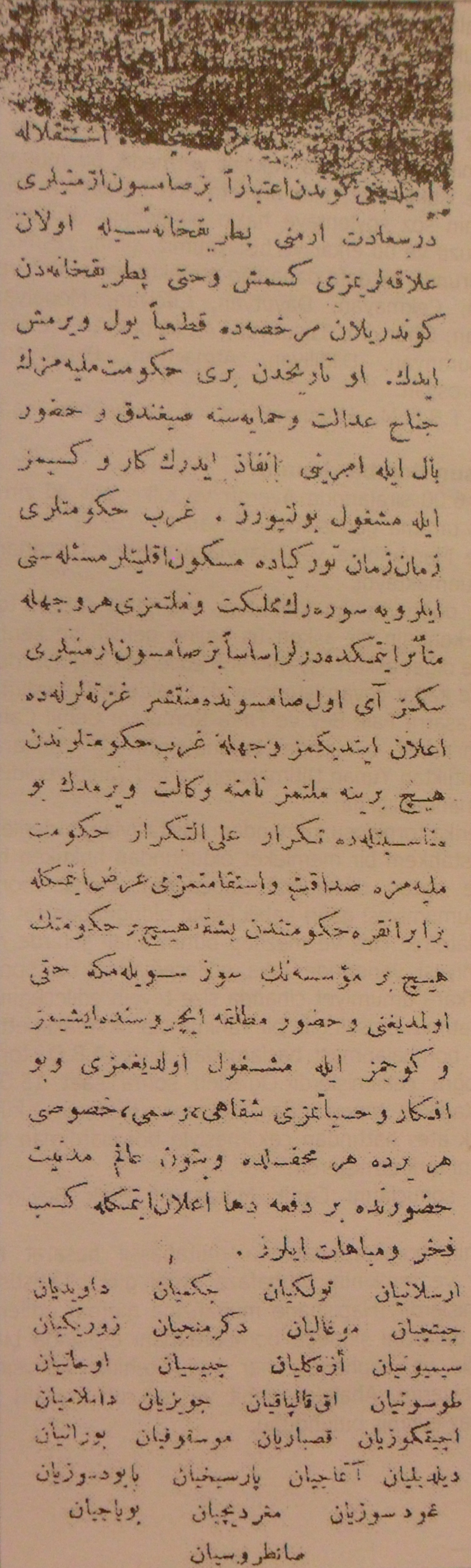 Samsun Ermenilerinin İstanbul Ermeni Patrikhanesinden ayrıldığını ve Ankara Hükûmetine bağlılıklarını açıkladıkları bağlılık bildirisi.